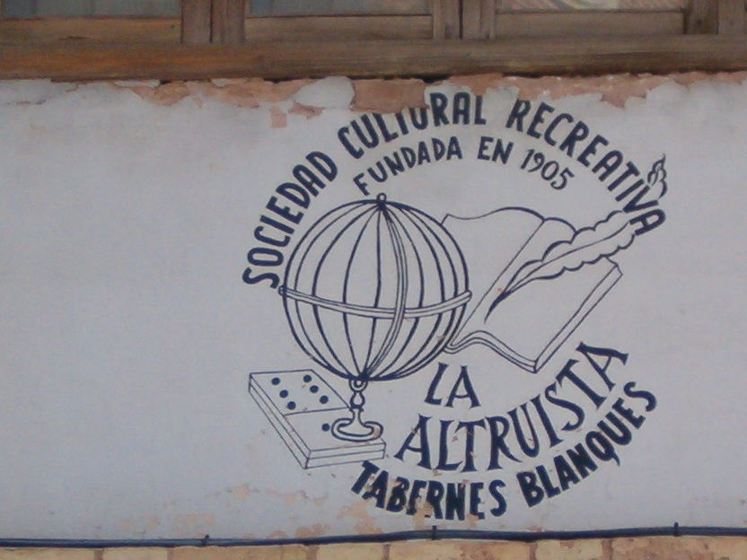 Símbolo de la Sociedad Cultural y Recreativa 'La Altruista', el casino de Tavernes Blanques fundado en 1905